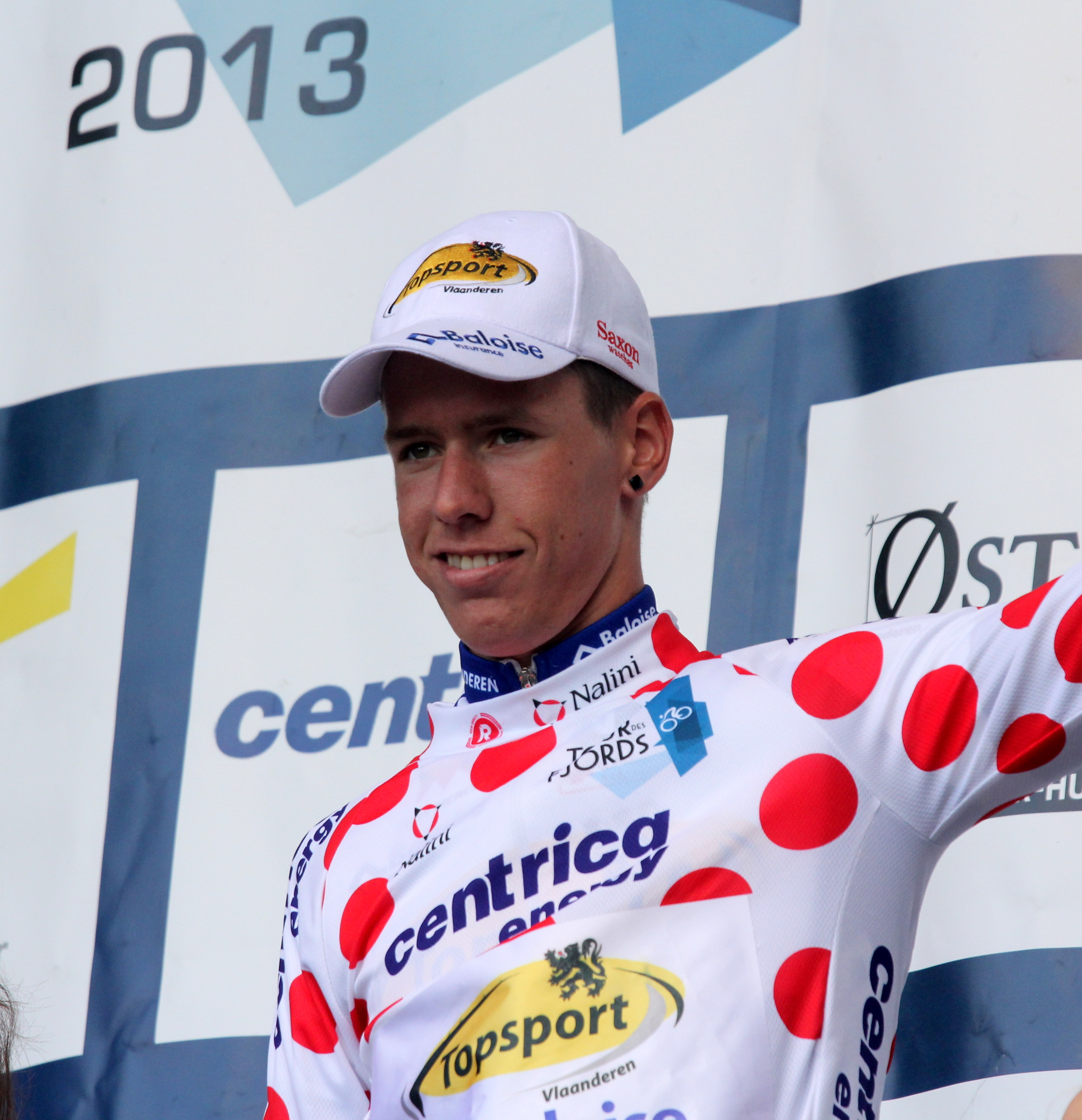 Kenneth Vanbilsen